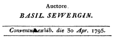 Французское написание имени: Севергин Василий Михайлович